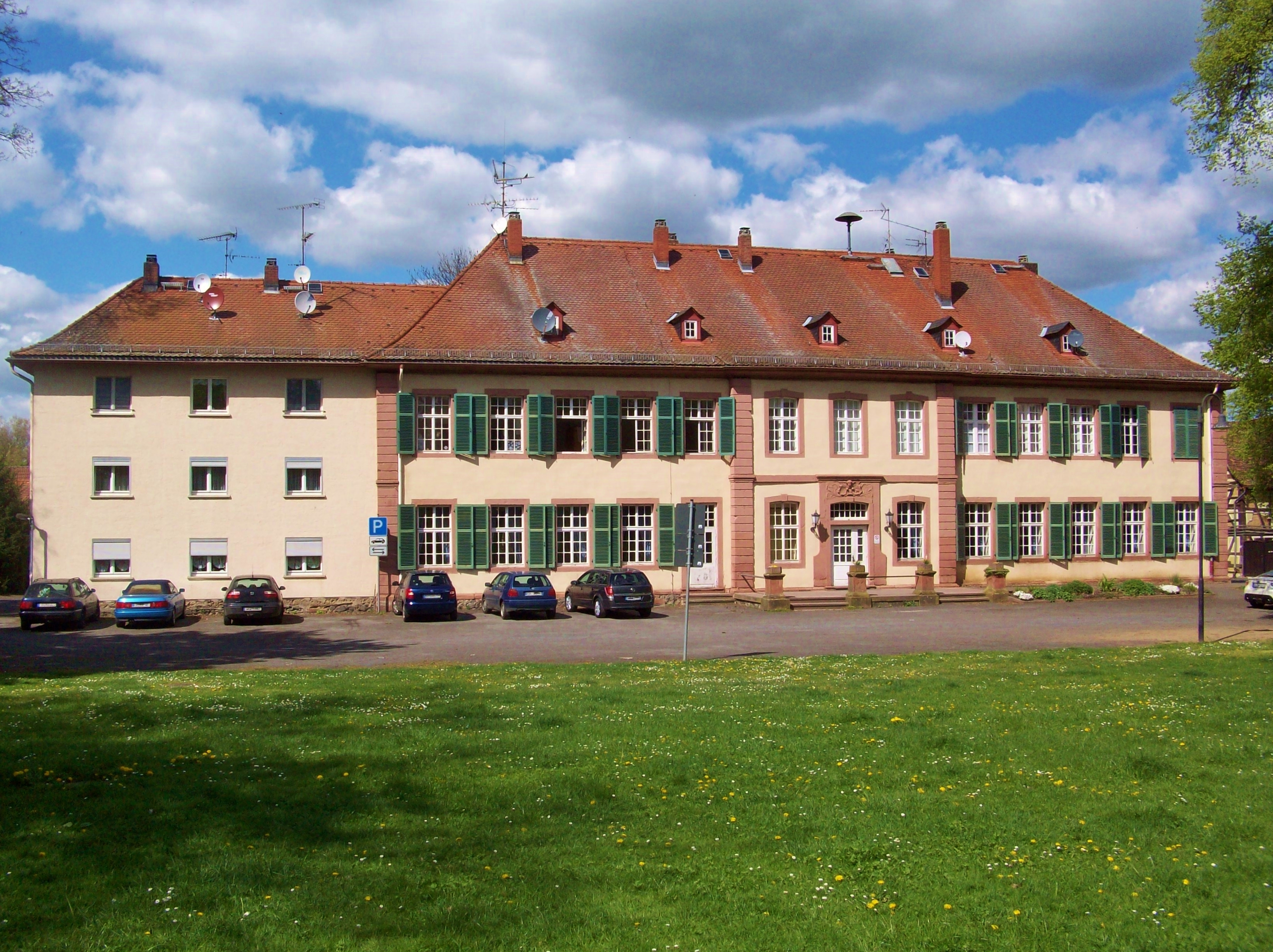 Das Schloss in Südtotale